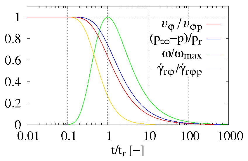 Geschwindigkeit, Rotation und Druck eines Fluidelementes über die Zeit in einem Oseenschen Wirbel